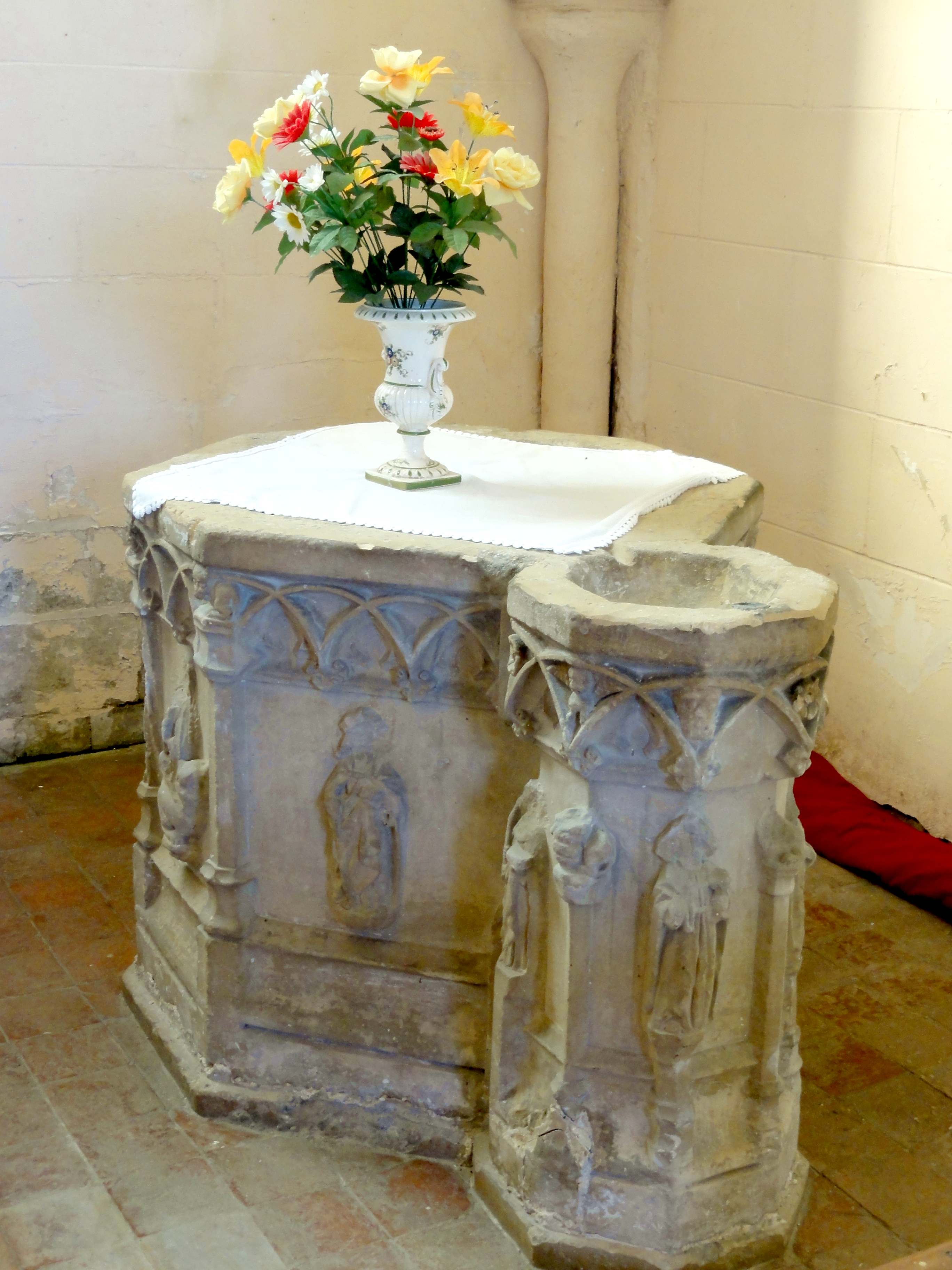 Fonts baptismaux (voir titre).